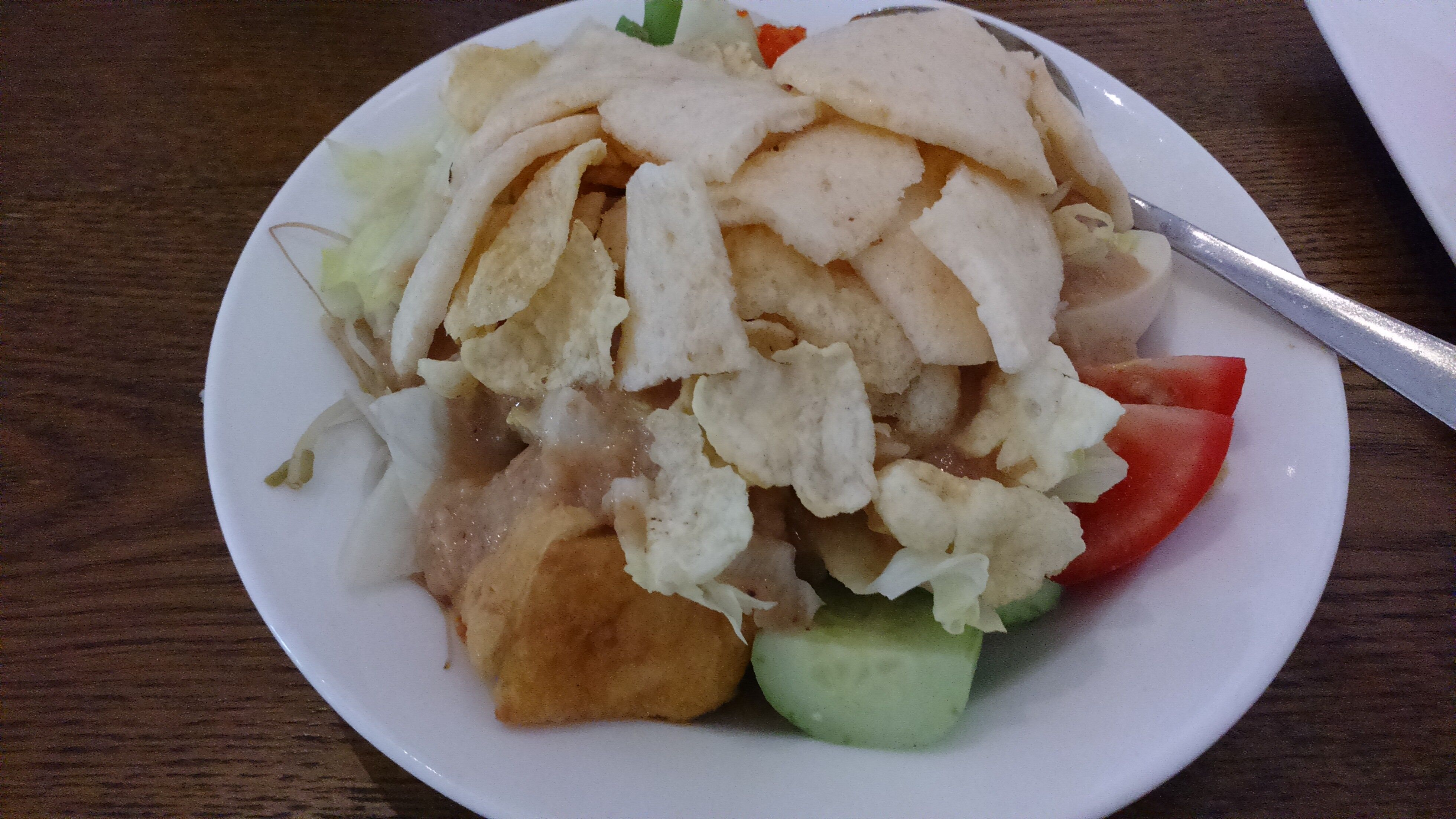 一份混合蝦片，苦果片，炸豆腐，米糕和各種蔬菜的加多加多